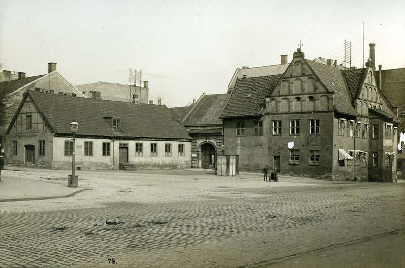 Garnisonssykehuset ( Rådmannsgården) i Rådhusgata med hovedfasade og sidefasade mot Øvre Slottsgate og Christiania Torv. Eldste gjenværende gård fra den opprinnelige kvadraturen. Oppført for rådmann Lauritz Hansen i 1626. Sykehus i 1850-årene. Kjøpt av kommumen i 1897, kontorer for Kristiania Elektrisitetsverk. Anatomigården til venstre (Universitetets medisinske fakultet 1815- 1852). Byens eldste bevarte bindingsverkshus. Tidligere bolig for skarpretteren, senere, fra ca. 1860, billedhugger Brynjulf Bergsliens atelier (frem til ca. 1900). Gatelykt. Øvre Slottsgate inn til venstre.